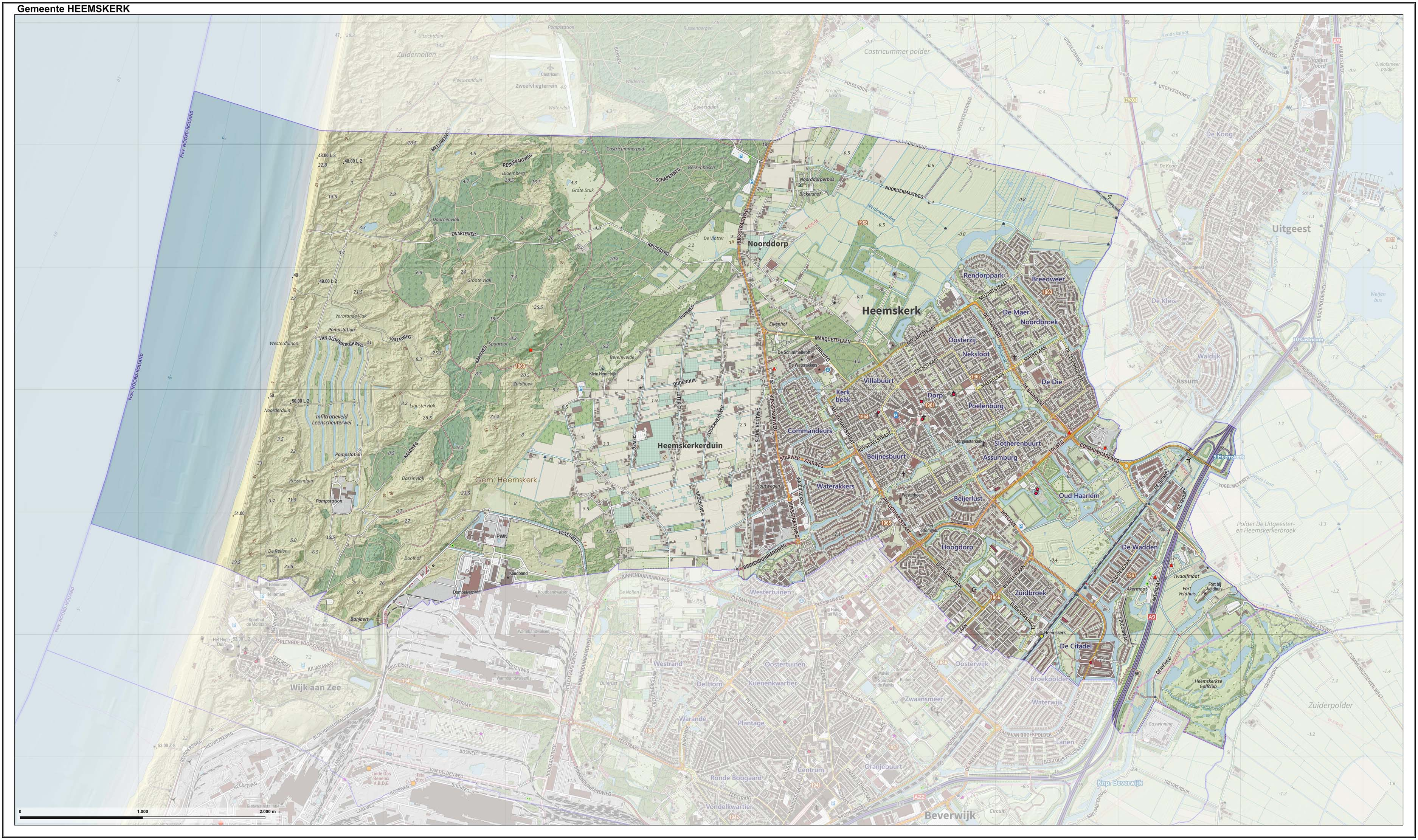 Topografische gemeentekaart. Resolutie: 400 pixels/km. Kaartbeeld samengesteld uit de open geodata van de Top10NL en Top25namen (Kadaster), Creative Commons-BY licentie. Gebouwvlakken uit open geodata BAG extract. Wegen uit de OpenStreetMap, OpenStreetMap community. Reliëfschaduw uit de Actuele Hoogtekaart AHN2. Samenstelling en kleurenschema: Jan-Willem van Aalst, met QGIS. Zie ook de Legenda.